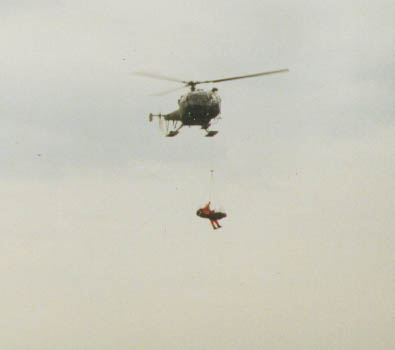 Alouette III